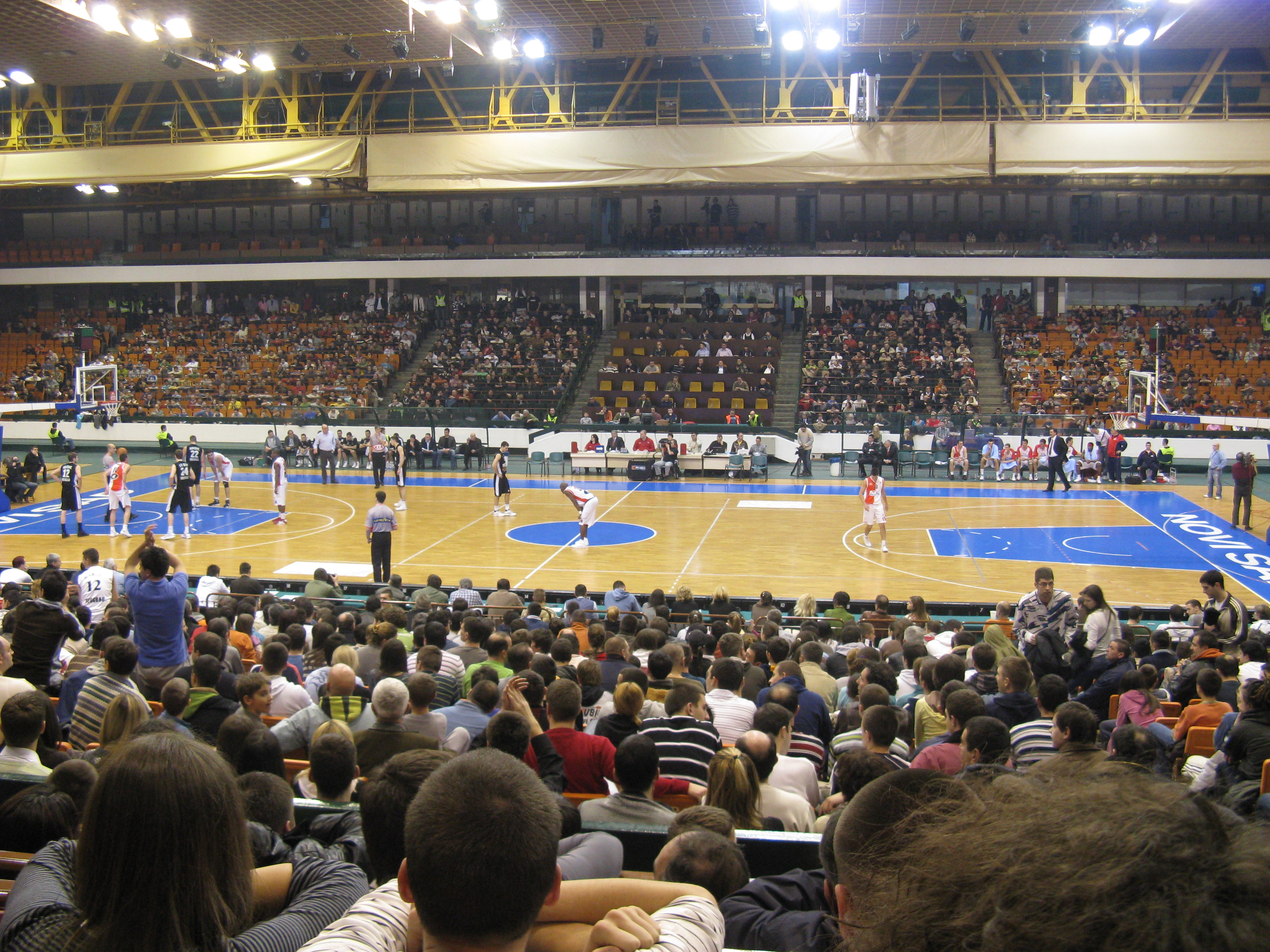 Utakmica Jadranske lige Vojvodina-Partizan